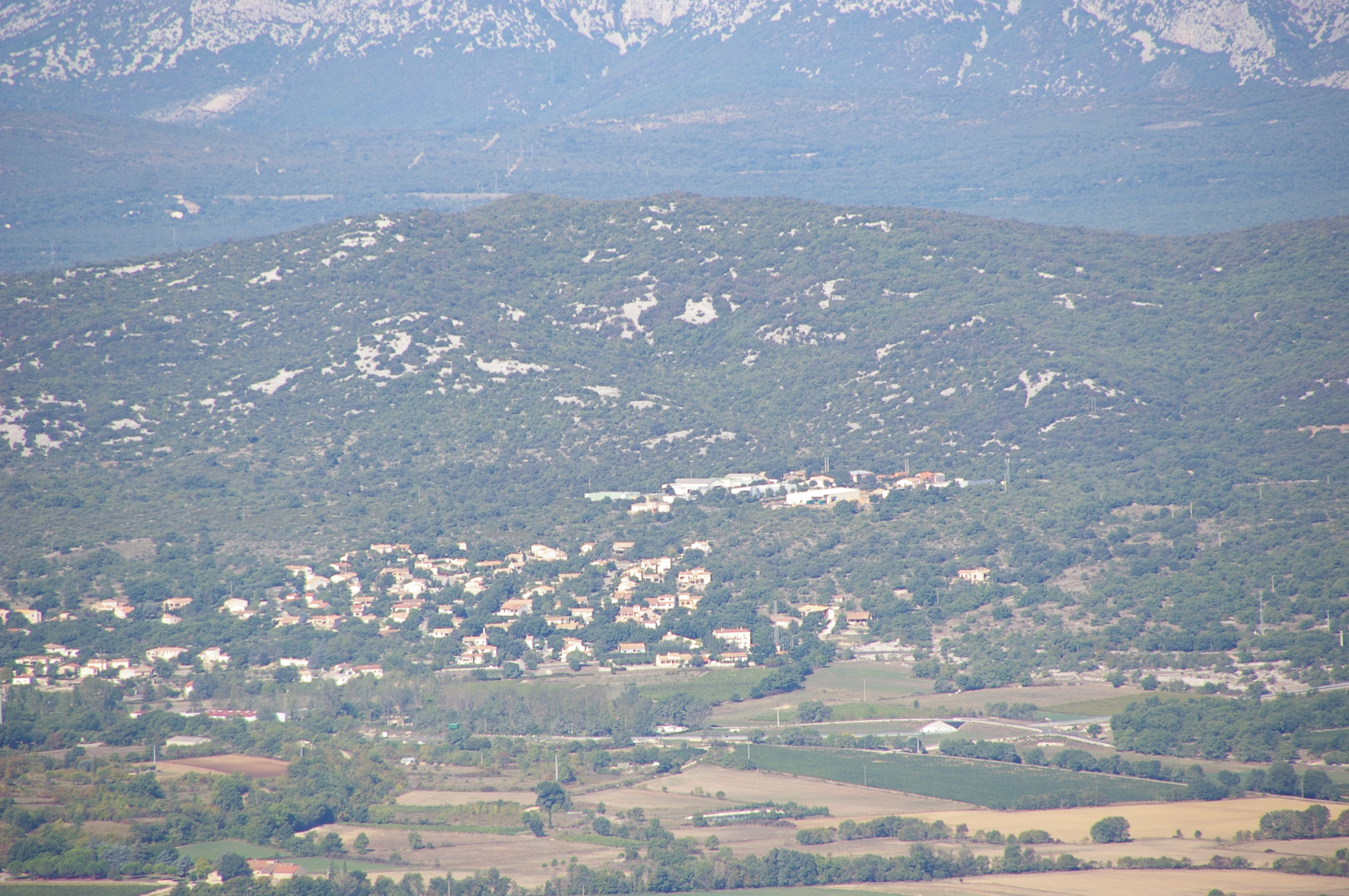 Paysage du site de St Martin de Londres au contact du bassin de Londres et des garrigues